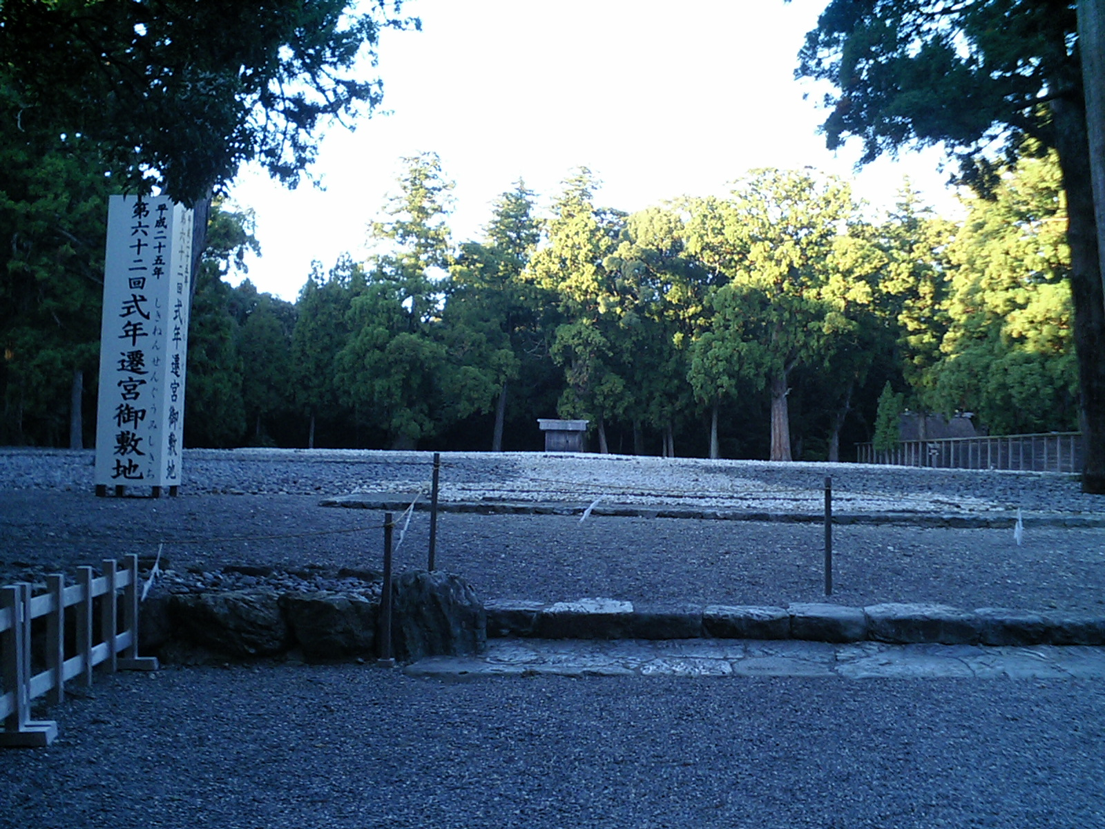 神宮内宮平成二十五年第六十二回式年遷宮御敷地。2005年11月16日に参詣。